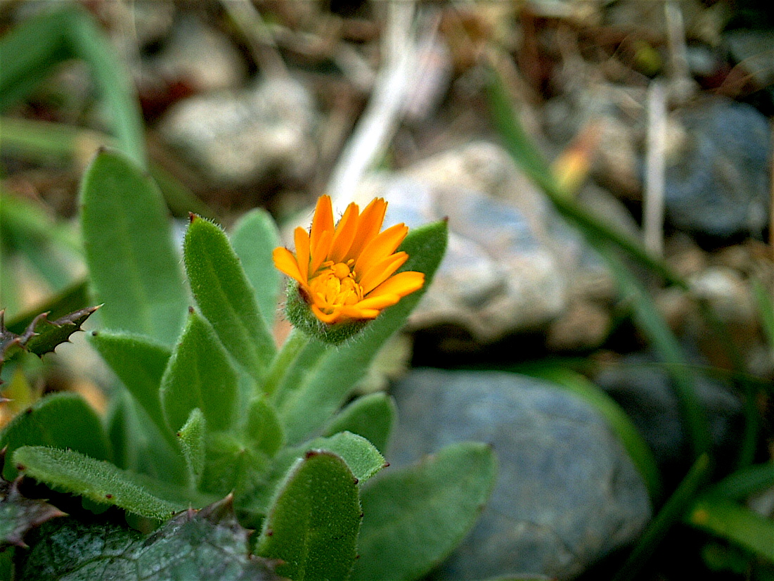 Calendula arvensis